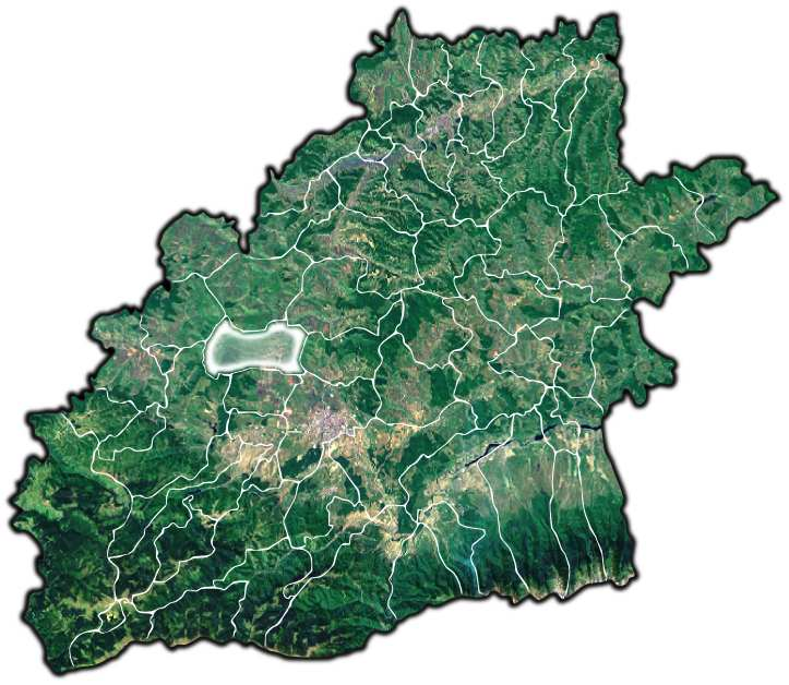 Ocna Sibiului jud Sibiu.